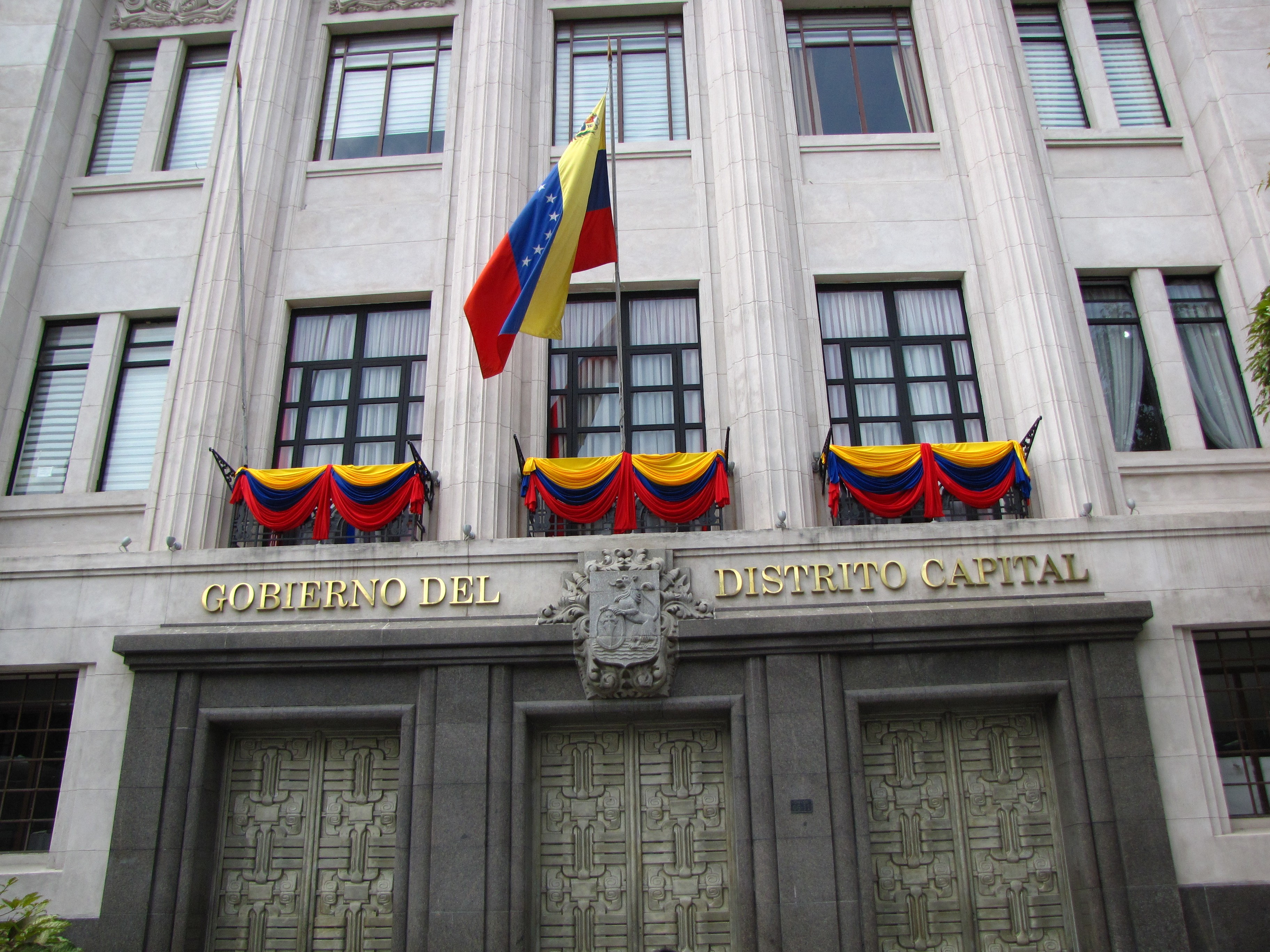 Lugar: Caracas, Venezuela.